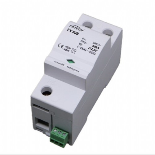 Õhksädemik liigpingepiirik